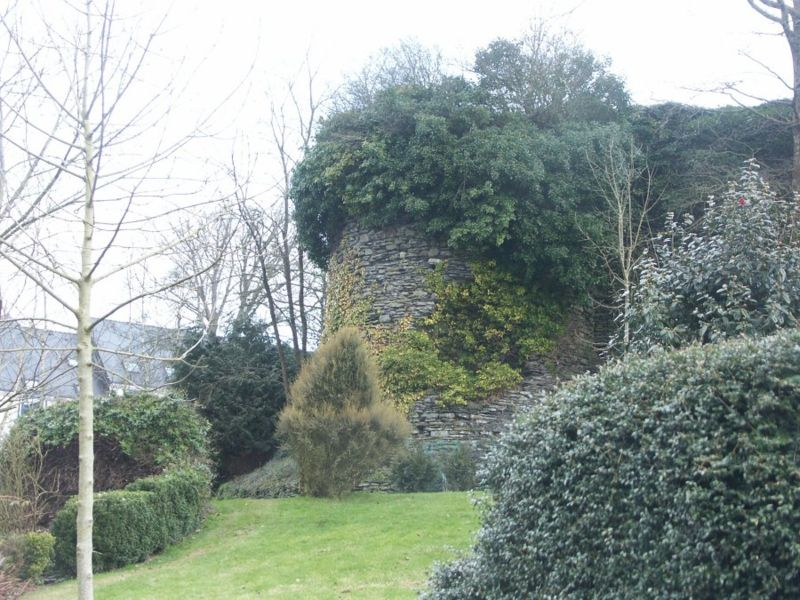 Donjon de l'ancien château de Châteaulin.